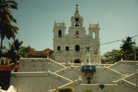 Die Kirche Our Lady of the Immaculate Conception in Panaji, der Hauptstadt Goas